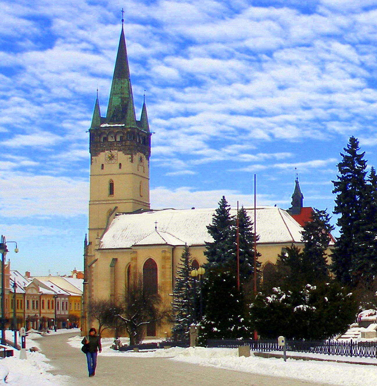 Dóm Svätého Mikuláša na Hlavnej ulici v Prešove.